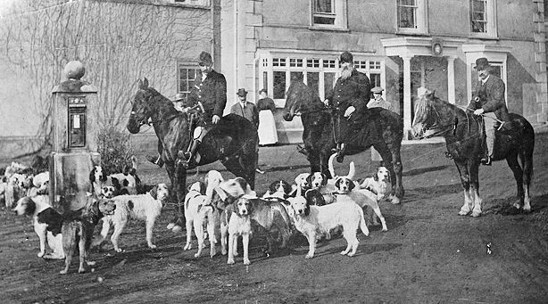 Ffotograffydd/Photographer: P B Abery (1877?-1948) Dyddiad/Date: [194-?] Nodyn/Note: Image shows post box from Queen Victoria's reign. Cyfrwng/Medium: Negydd gwydr / Glass negative Maint/Dimensions: 119 x 163 mm. Cyfeiriad/Reference: PBA5/17 (pba00074) Rhif cofnod / Record no.: 4493910 Rhagor o wybodaeth am gasgliad P B Abery yn Llyfrgell Genedlaethol Cymru More information about the P B Abery Collection at the National Library of Wales